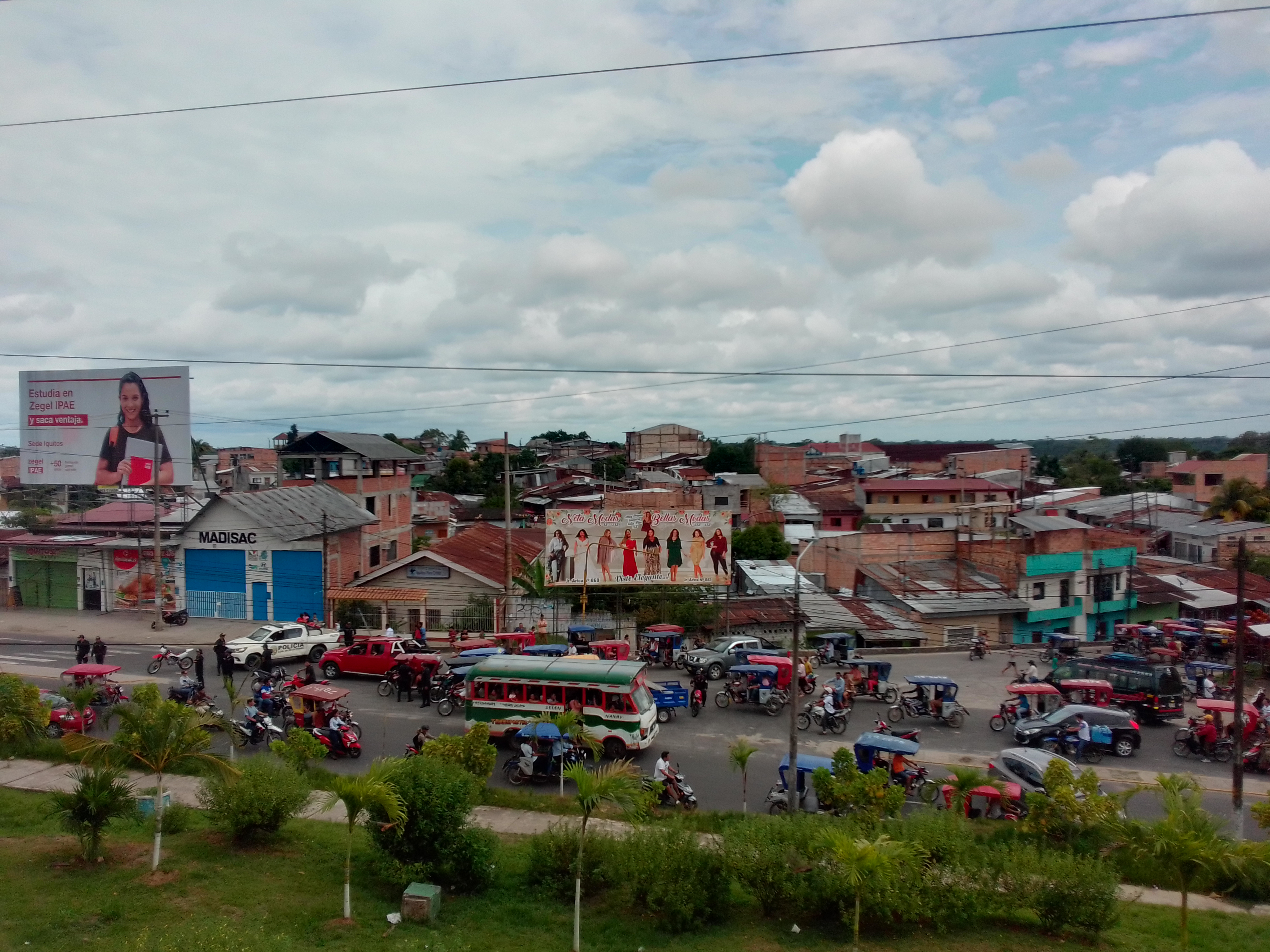 Bloqueo de Iquitos durante la cuarentena de Perú en 2020